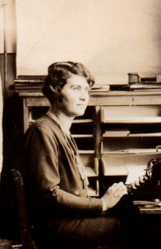 Elvira Mancuso (Pietraperzia, 1867 – Pietraperzia, 1958) scrittrice e insegnante italiana